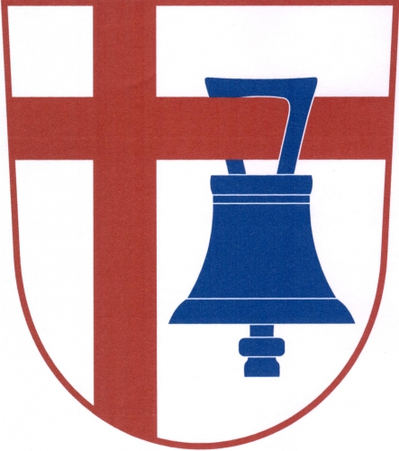 znak, Radhošť, okres Ústí nad Orlicí